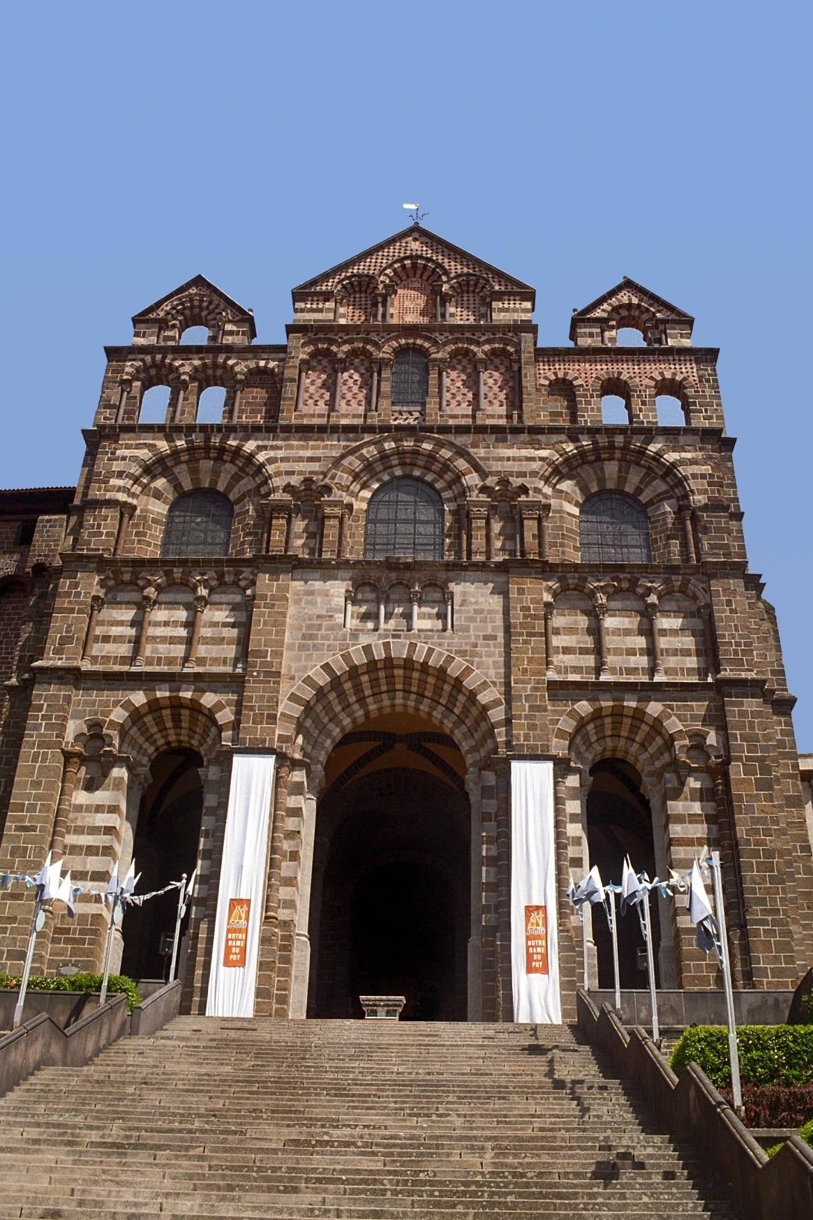 France - Velay - Cathédrale Notre-Dame-de-l'Annonciation du Puy-en-Velay